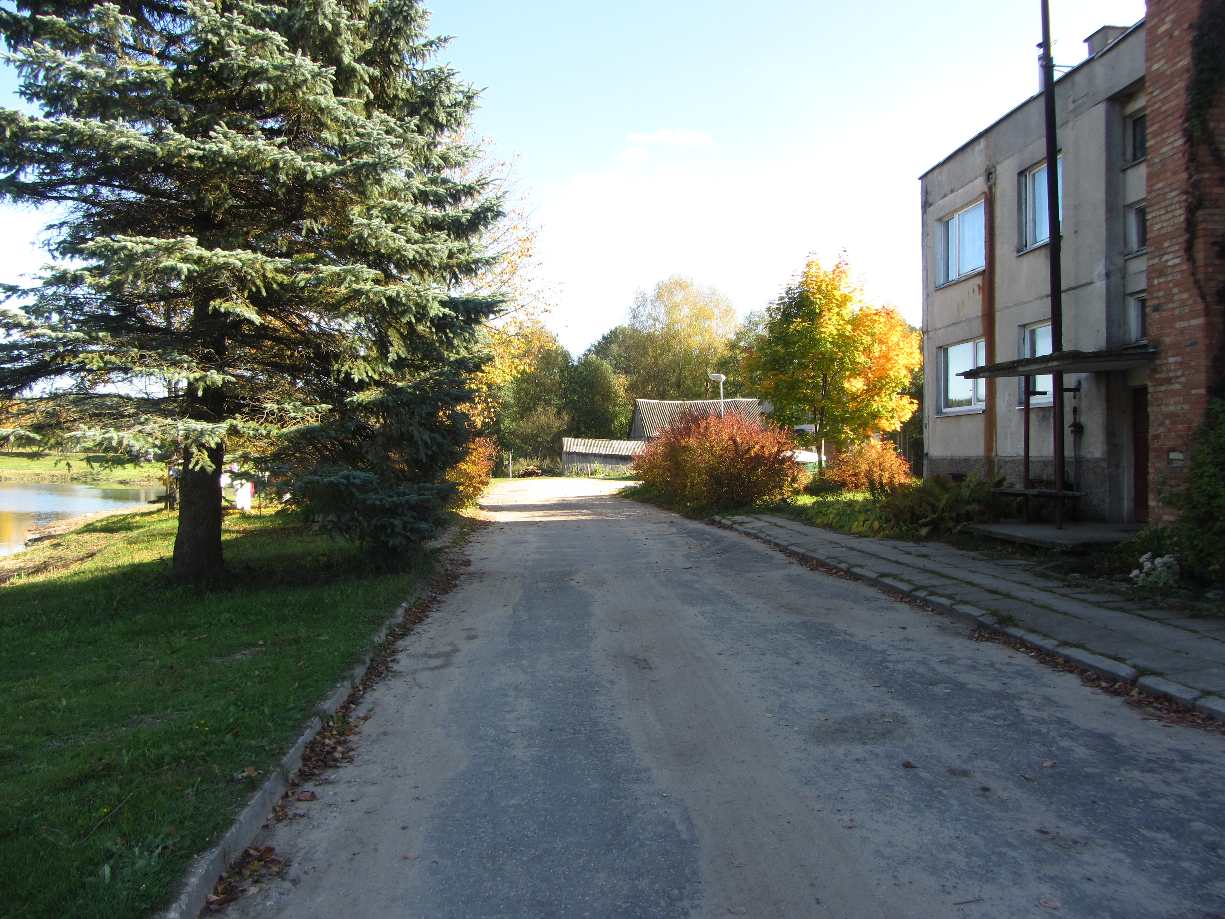 Strigailiškis, Lithuania